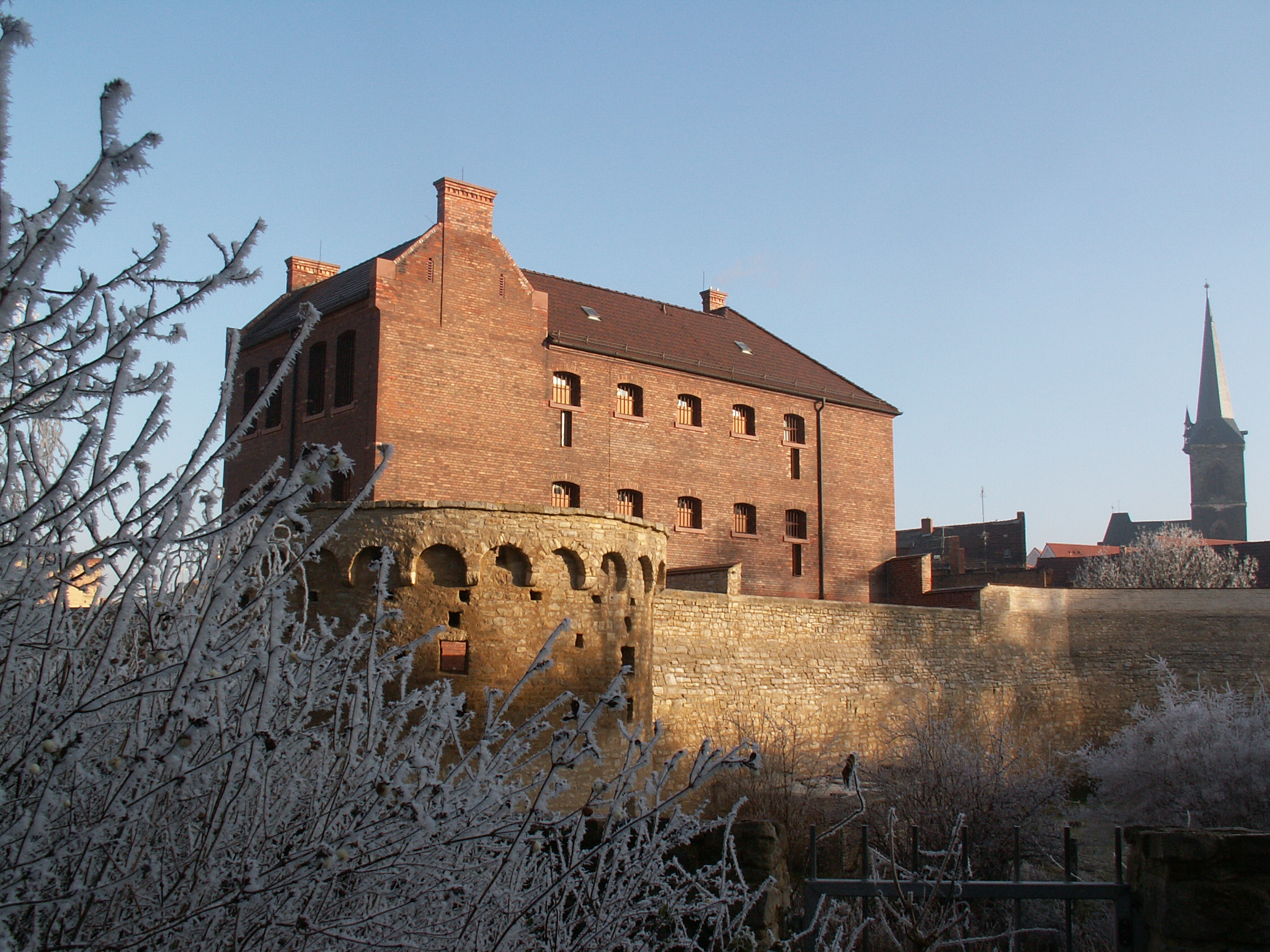 Kriminalpanoptikum im ehemaligen städtischen Gefängnis Aschersleben